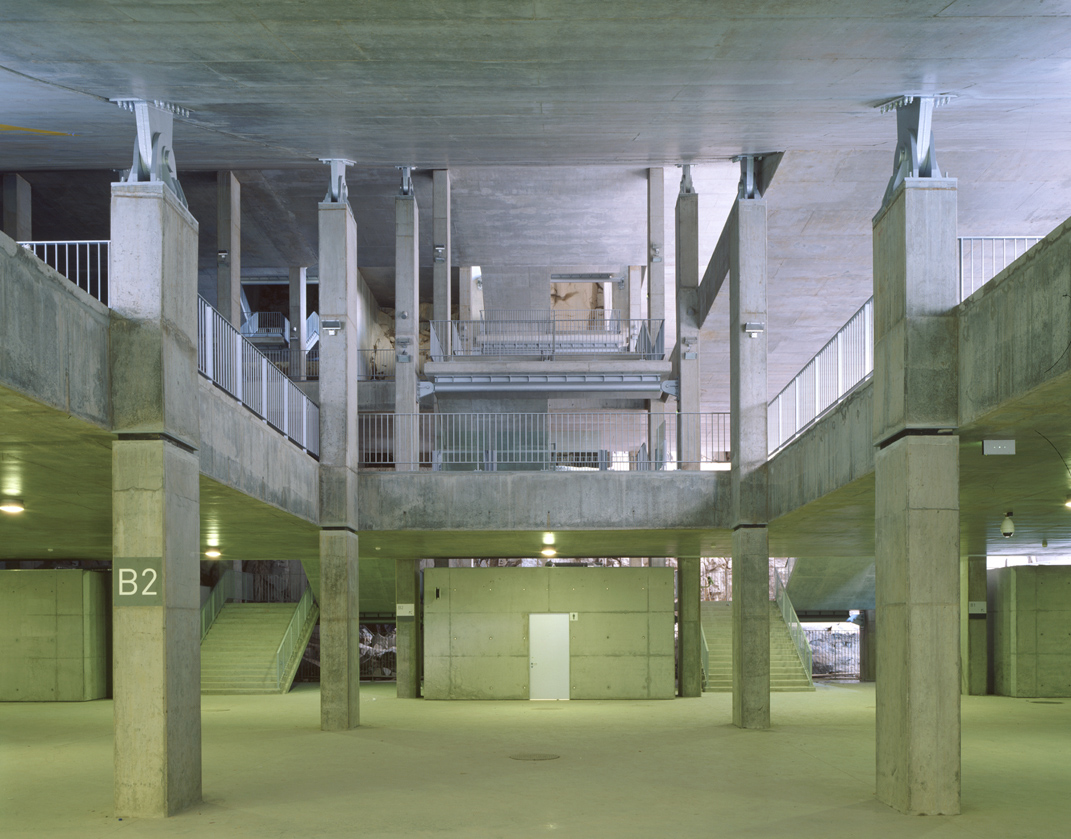 Eduardo Souto de Moura - Braga Stadium 30.jpg